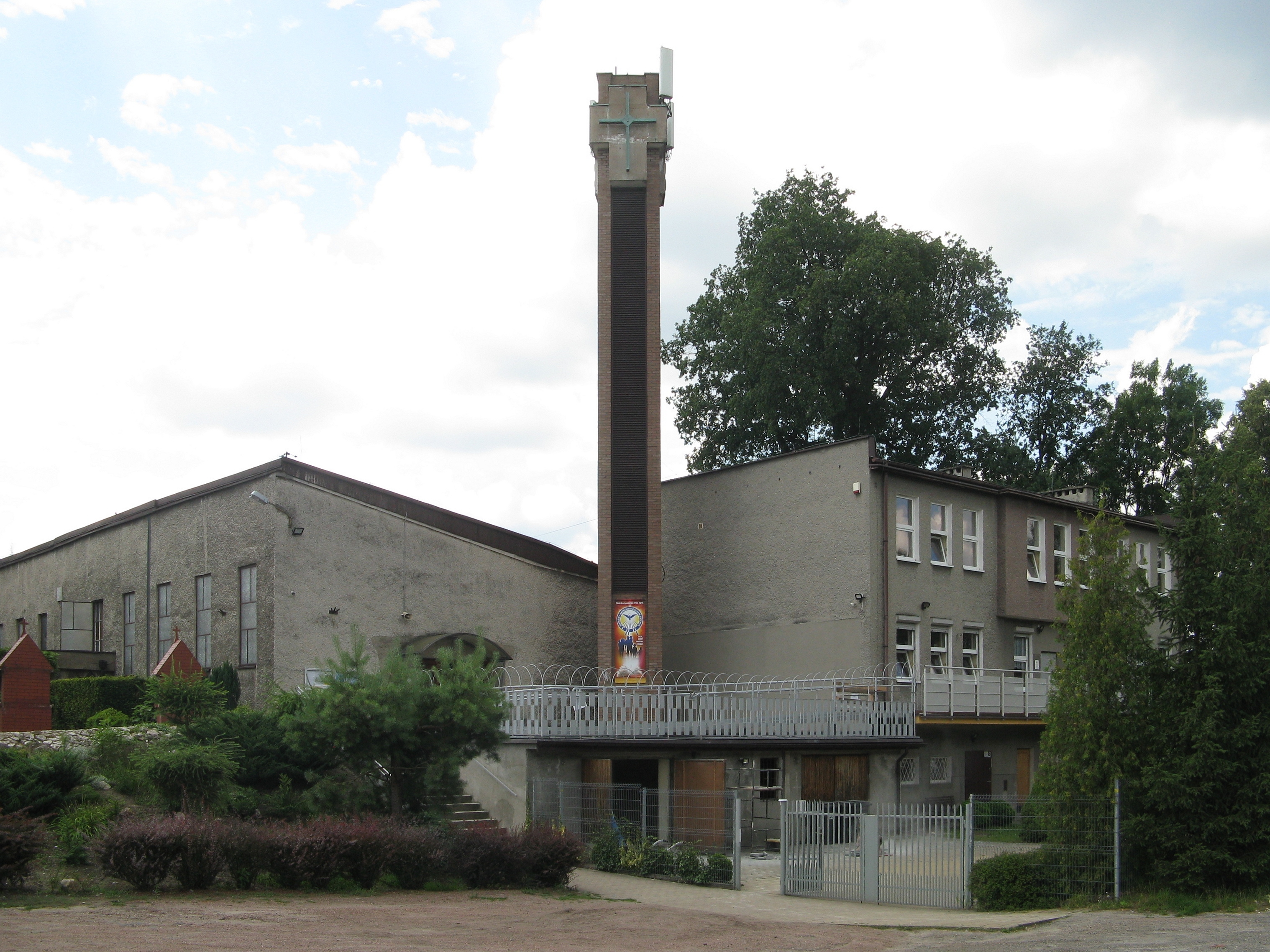 Kościół św. Antoniego w Katowicach-Starych Panewnikach (po lewej).